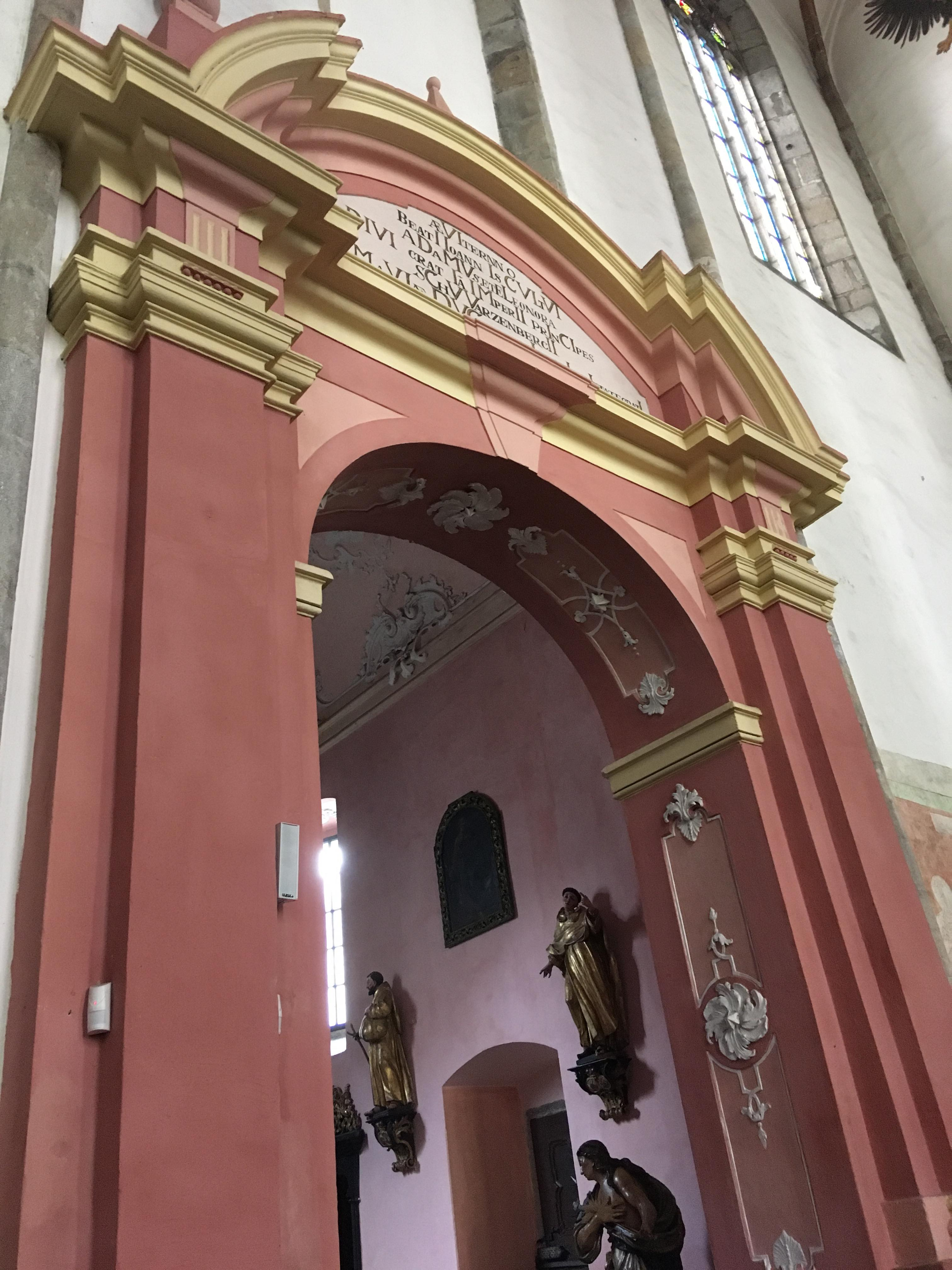 портал каплиці з костела святого Віта в Чеському Крумлові